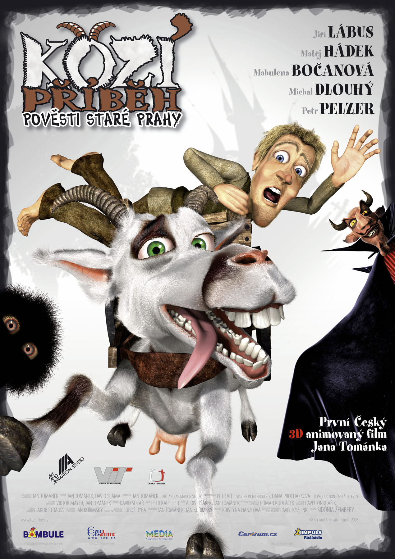 Kozí příběh plakát